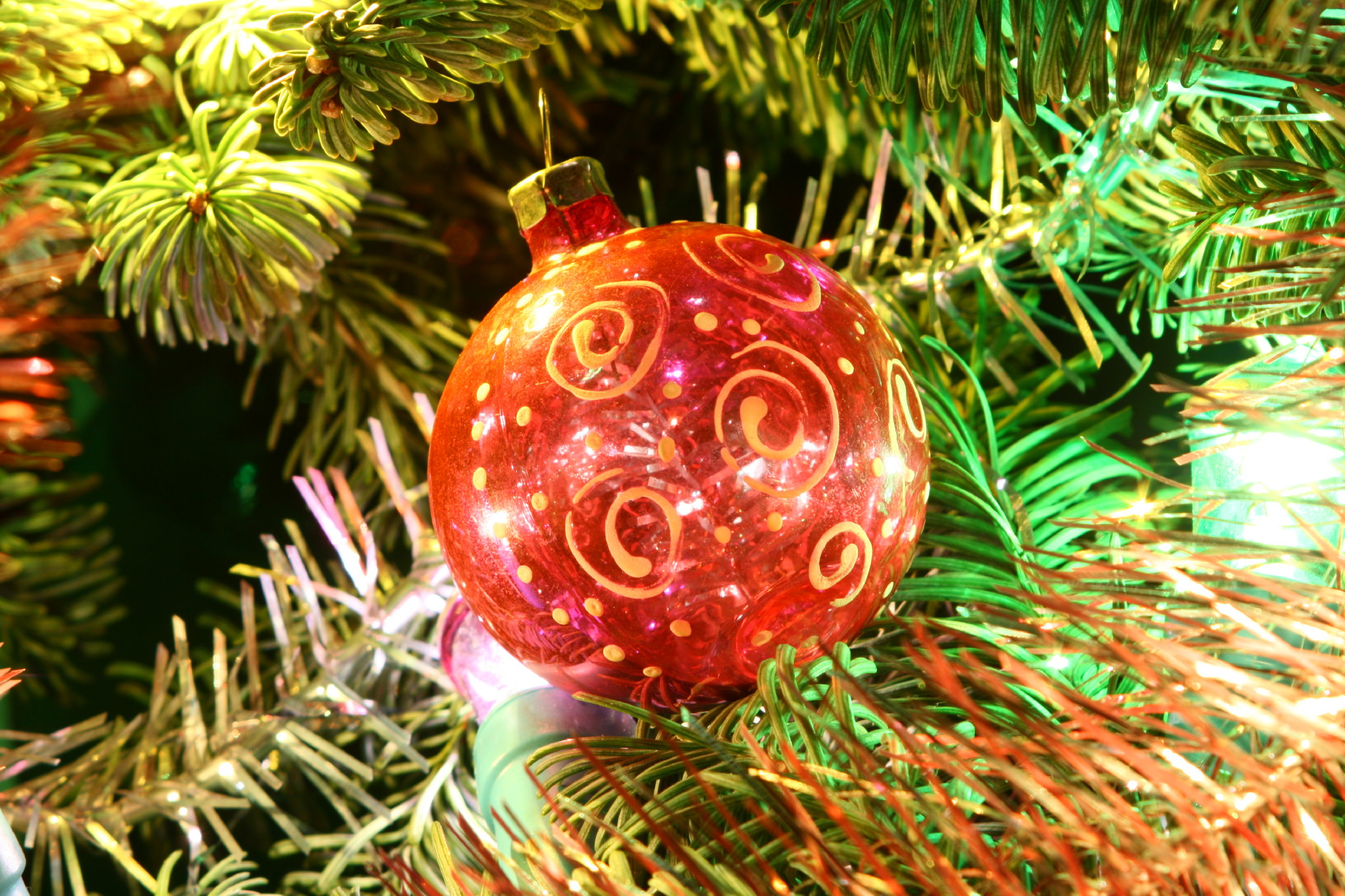 Елочное украшение "Шар с драгоценностью". Производство ГДР, 1970.